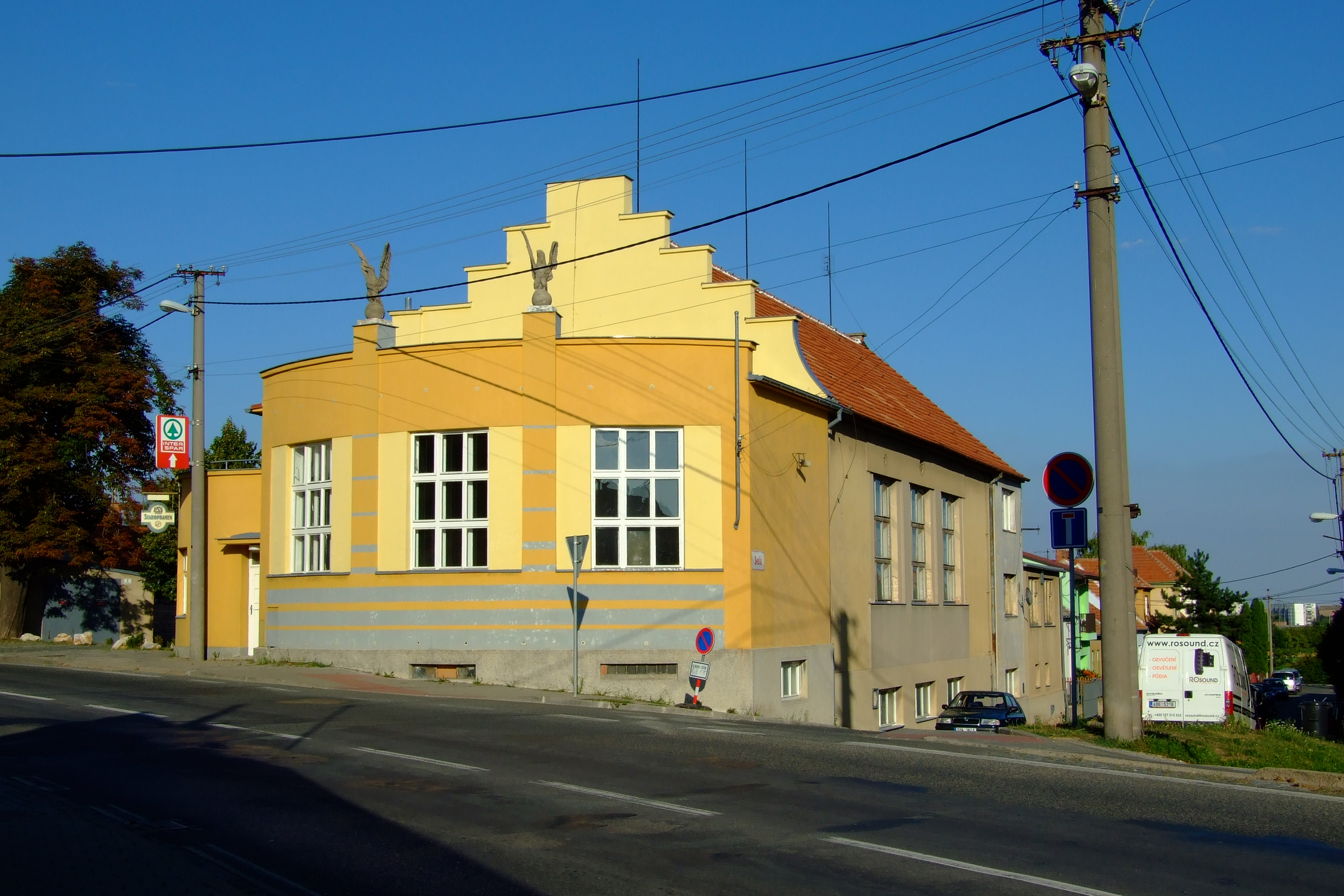 Orlovna, Brno-Bosonohy - kulturní sál s výčepem